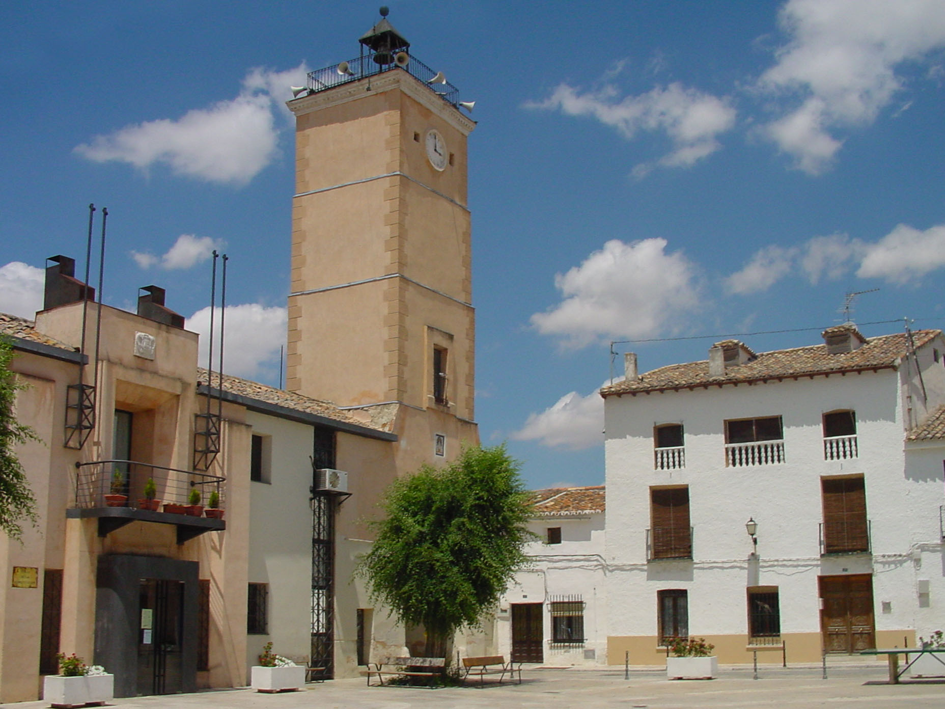 Ayuntamiento y Torre del Reloj de Fuentidueña de Tajo|Fuentidueña de Tajo.